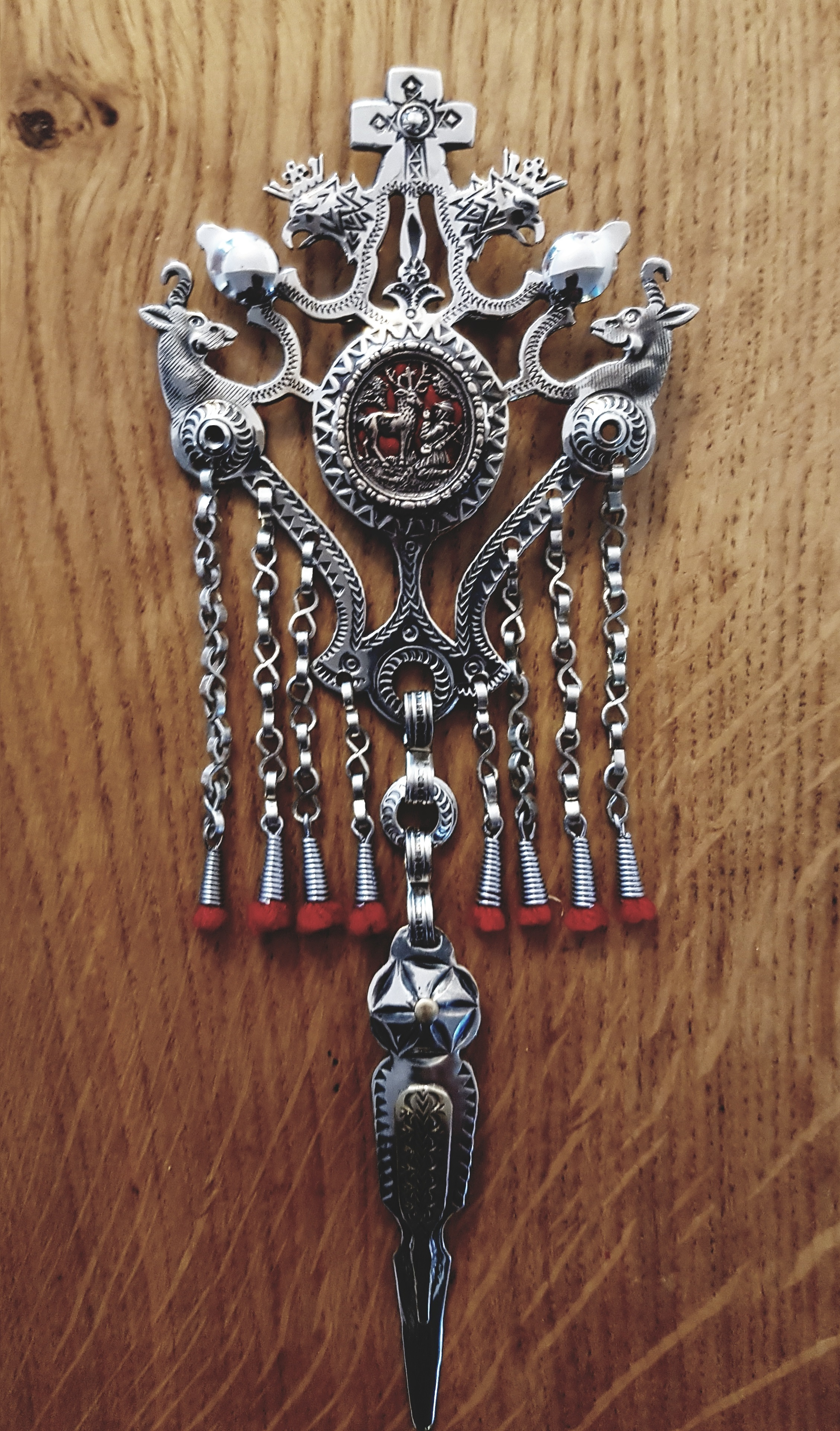 Spinka Góralska, Motywy myśliwskie, Wykonanie Paweł Gąsienica-Makowski, Zakopane